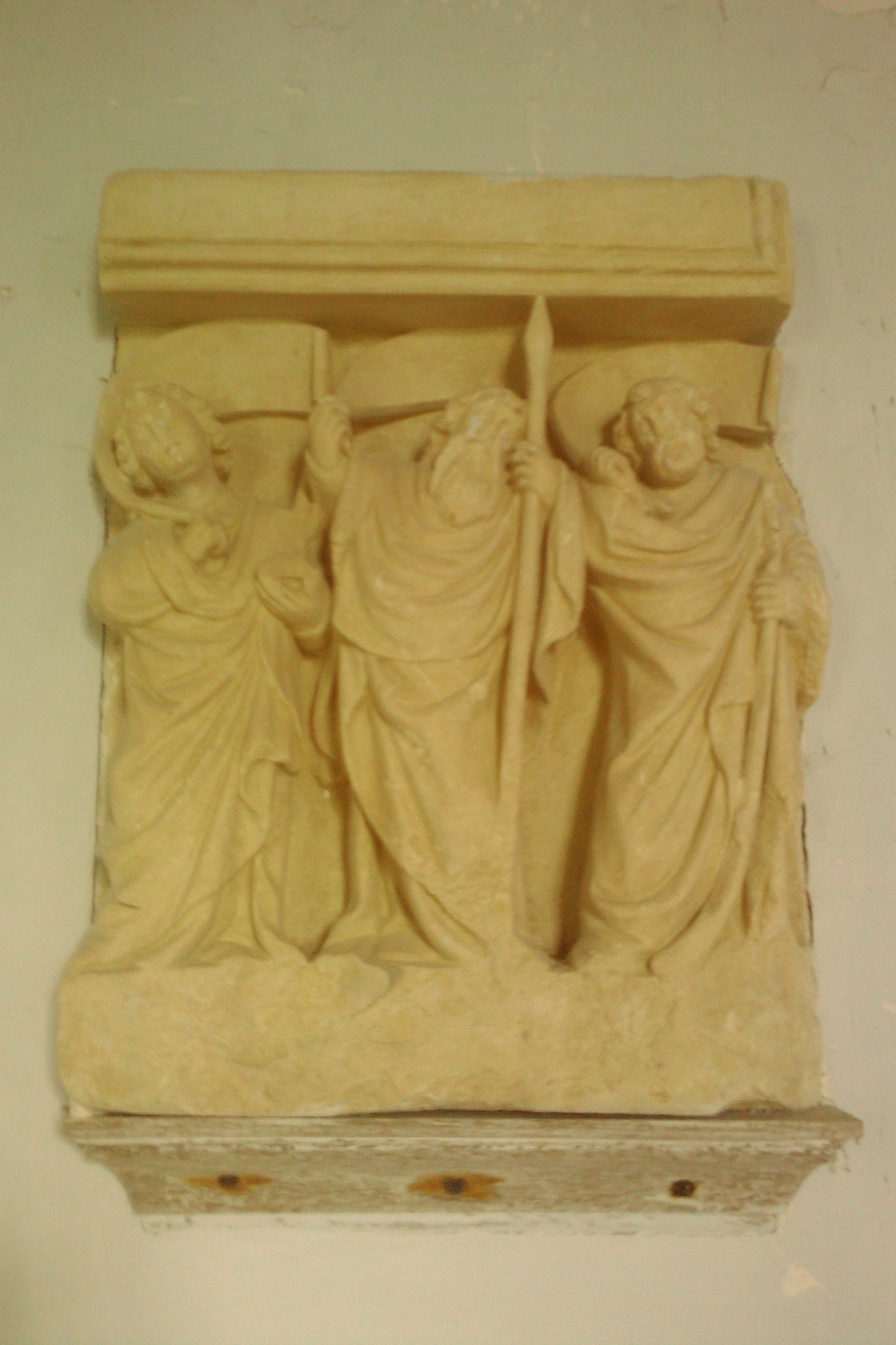 bas-relief : Saint Jean l'Evangéliste, saint Thomas et saint Jacques le Mineur, XVeme, La Chapelle Heuzebrocq